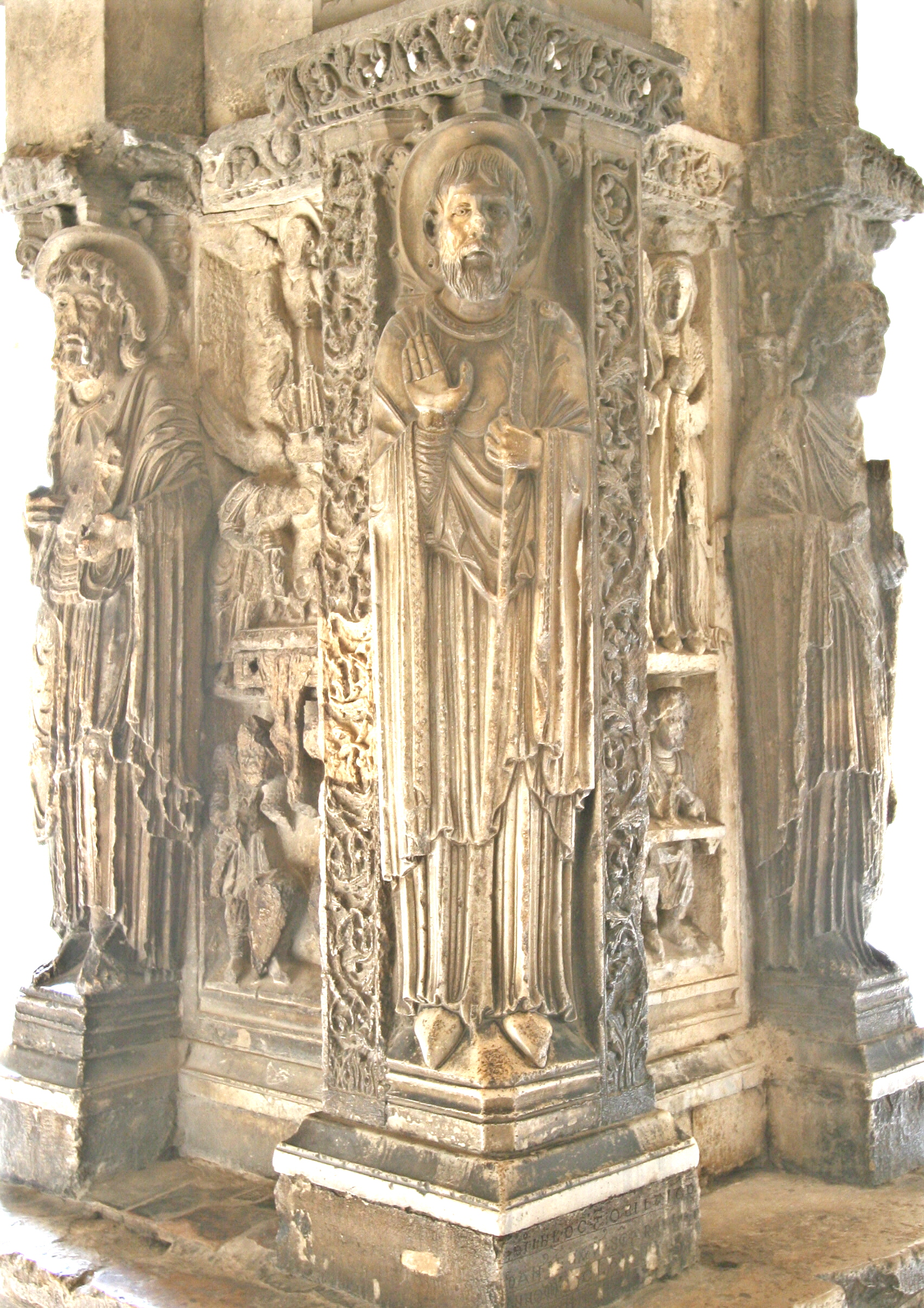 Pilier nord ouest du cloître Saint-Trophime à Arles représentant de gauche à droite : saint Pierre, la résurection, saint Trophime, les saintes maries et les marchands d'aromates et saint Jean l'évangéliste.